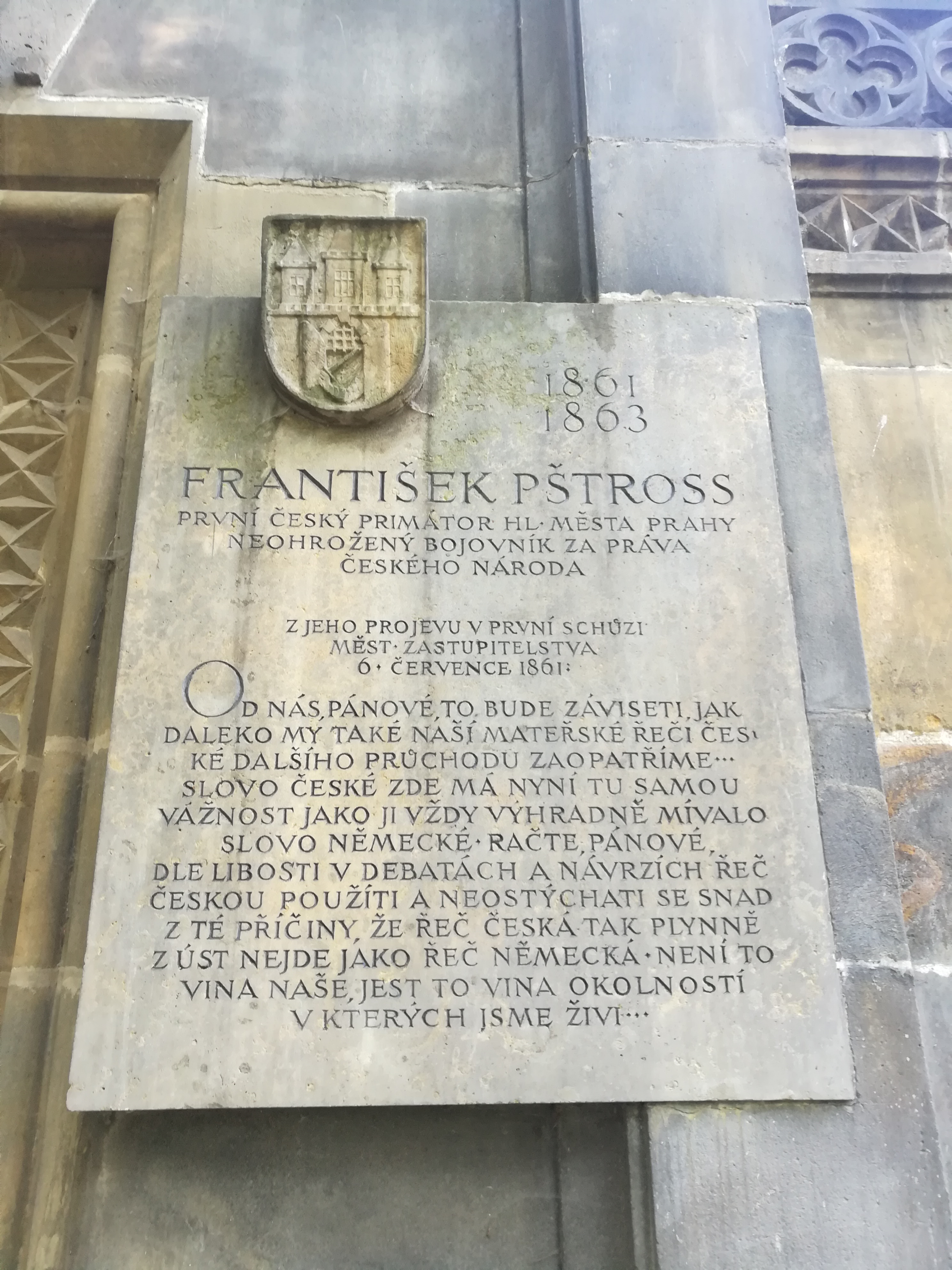 Deska na hrobce Františka Pštrosse na Olšanských hřbitovech s citací jeho projevu z prvního zasedání zastupitelstva města Prahy 6.7.1861 na téma znovuzavedení češtiny jako jednacího jazyka městského zastupitelstva